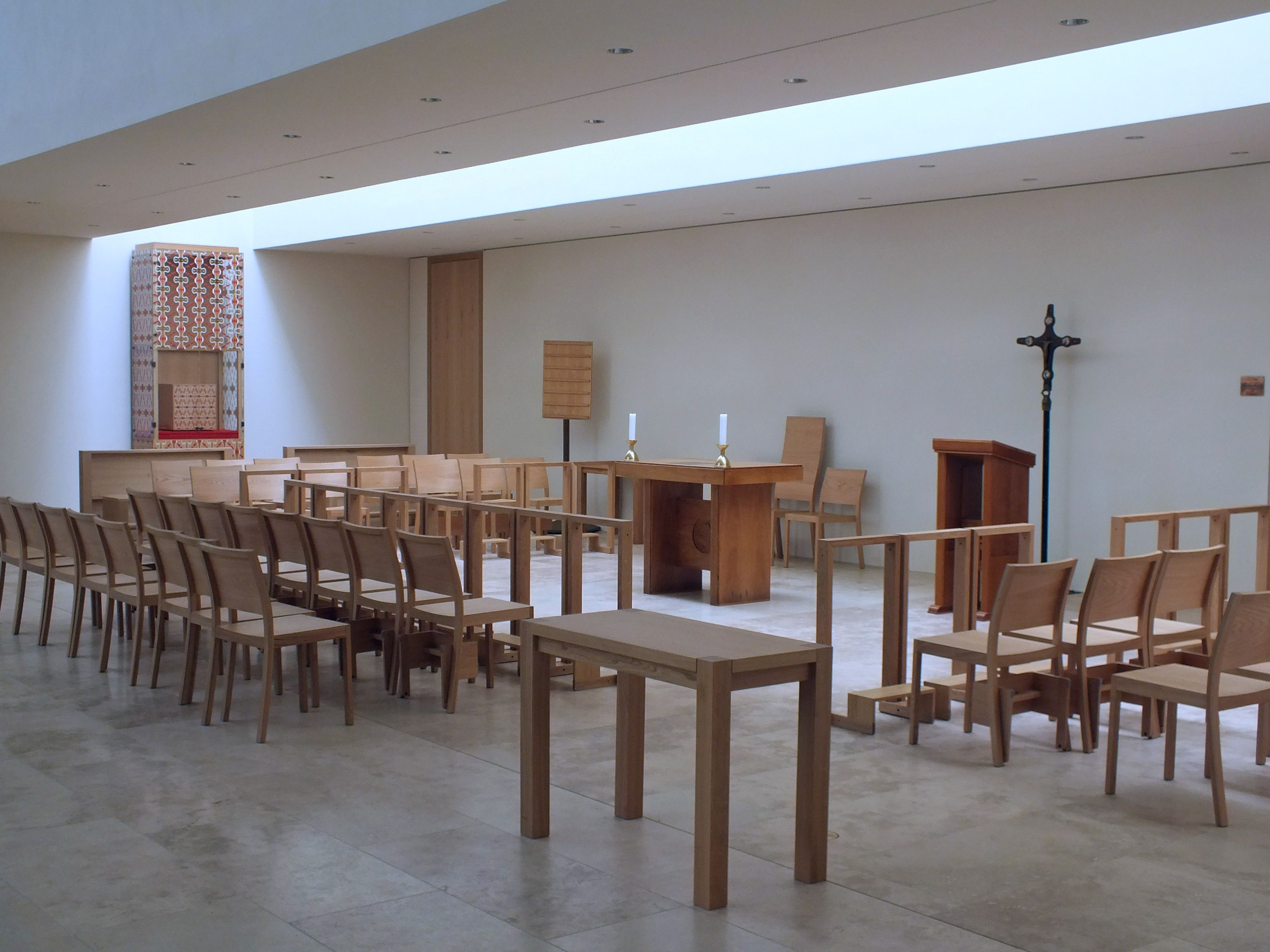 Die Kapelle in der Propsteikirche St. Trinitatis in Leipzig